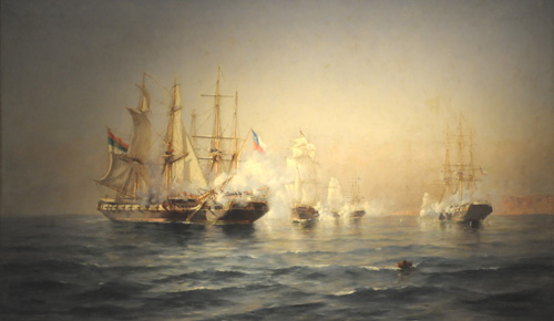 Combate naval de Casma, entre buques chilenos y corsarios franceses al servicio de la confederaciòn.